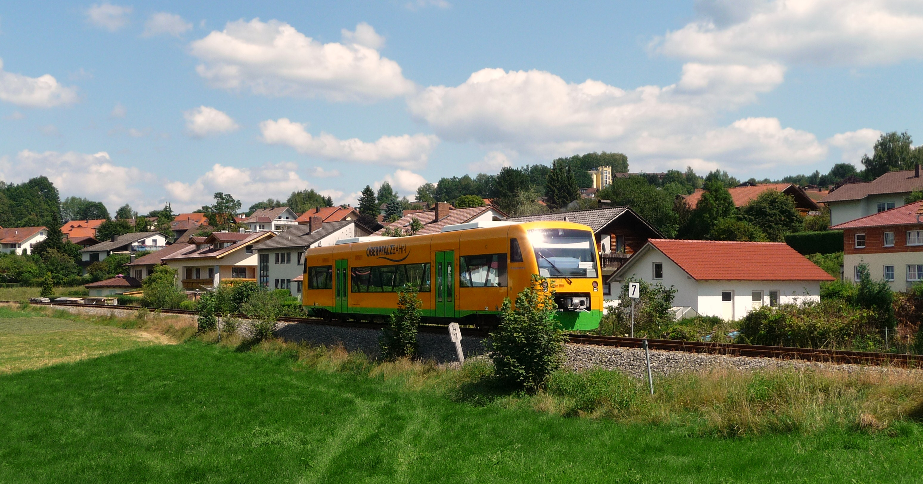 Ein Regio-Shuttle der Oberpfalzbahn unterwegs bei Grafenwiesen